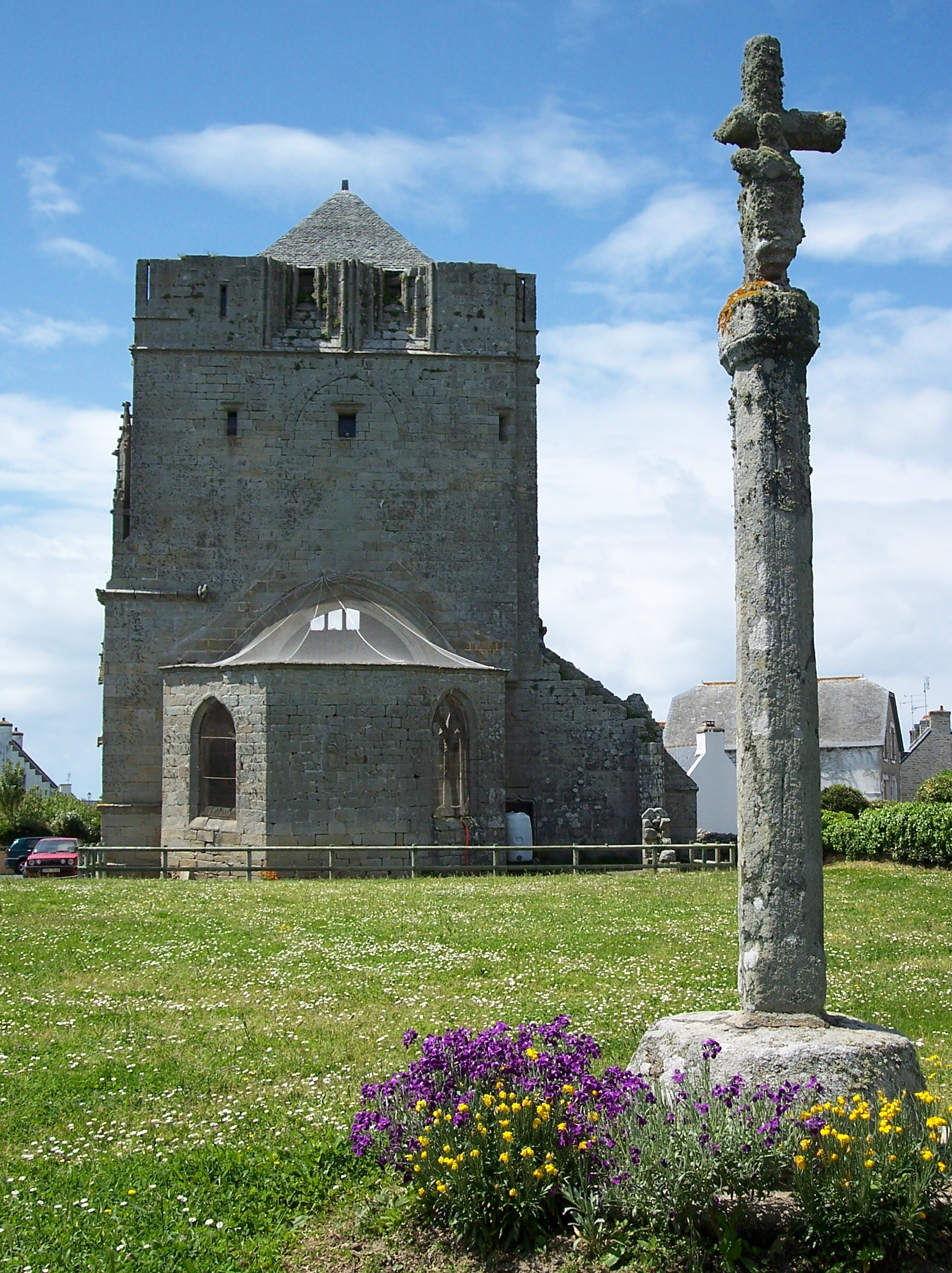 la Tour Carrée (Tal An Tour) à Saint-Guénolé - 23/05/2006 - photo Henri Camus